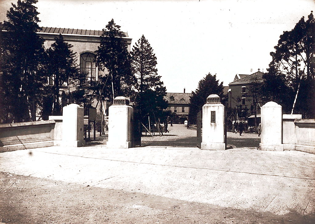 Entrée principale de l'université Waseda en 1932